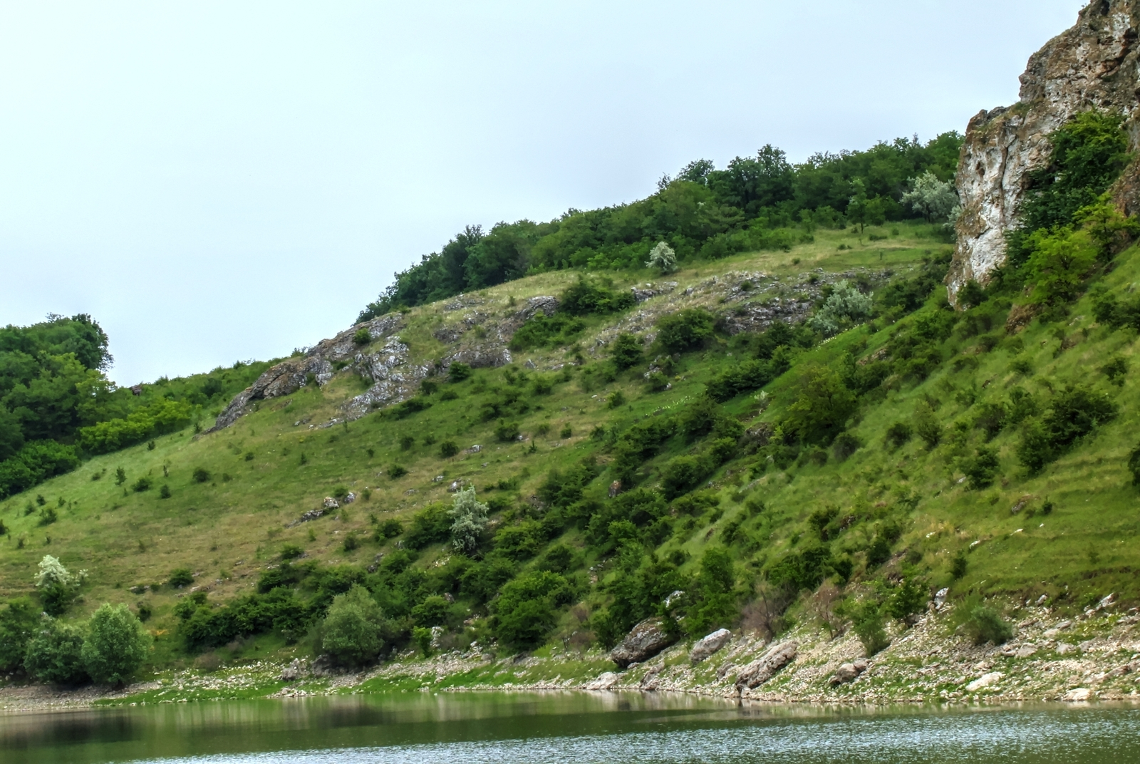 Проскурянский риф, монумент природы, находится в Рышканский район, Восточнее с. Дуруитоаря (код MD-RS-mn.A-064) A-064